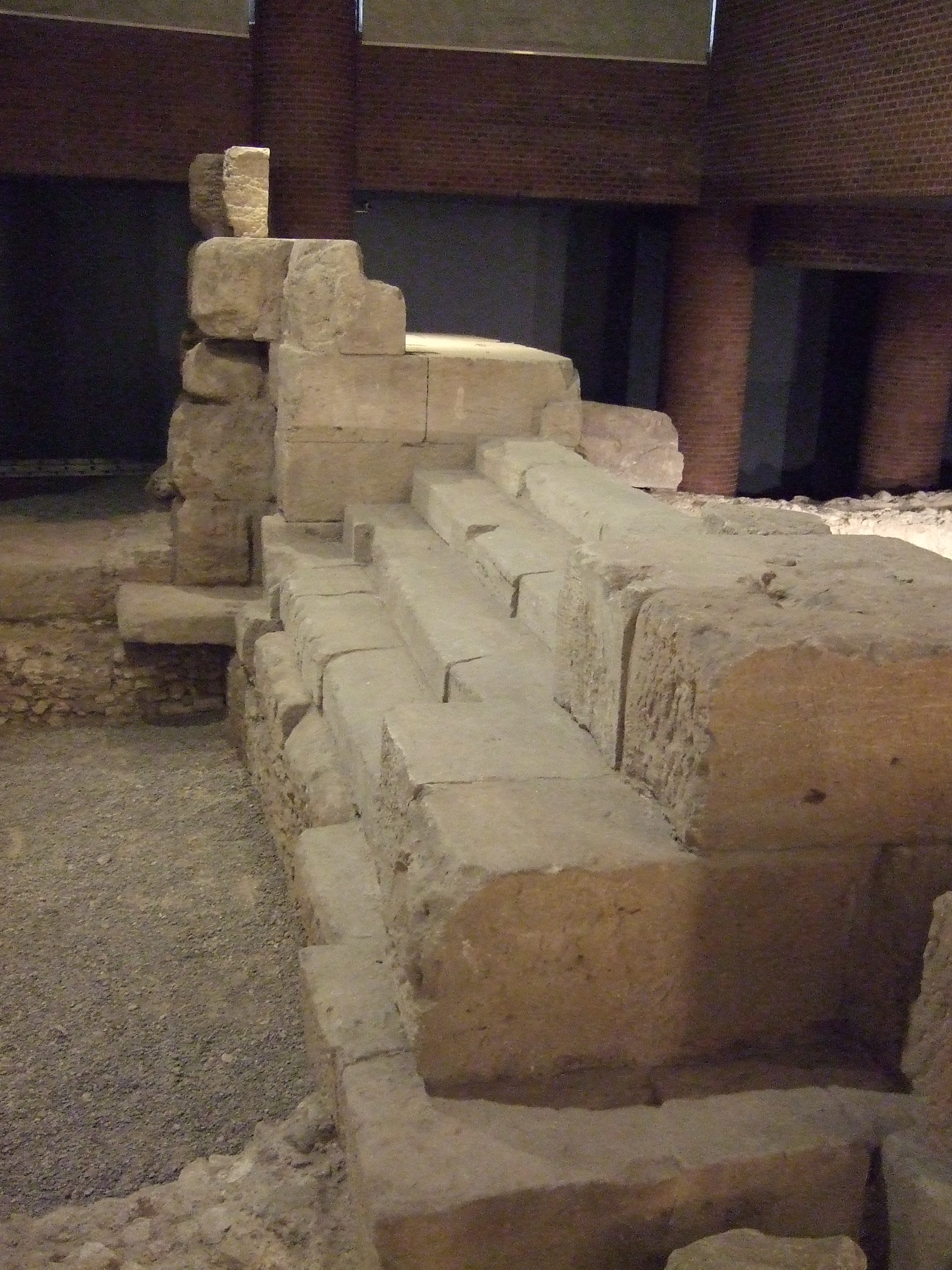 Zaragoza - Museo Puerto Fluvial - Ruinas - Marca Legio X